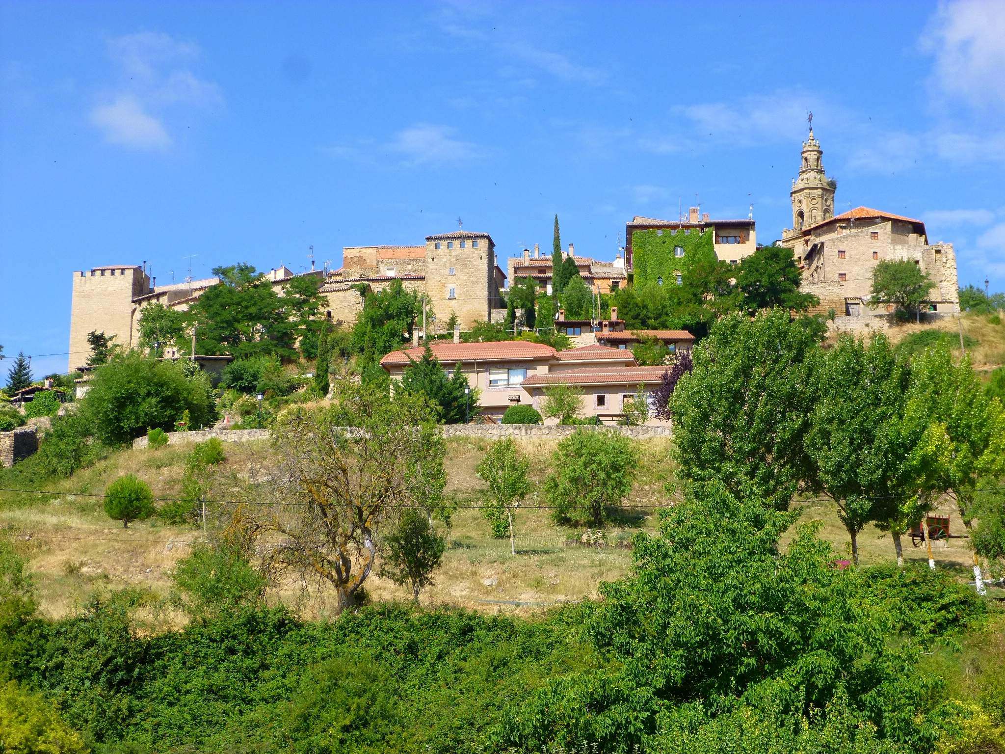 Labraza (Álava)